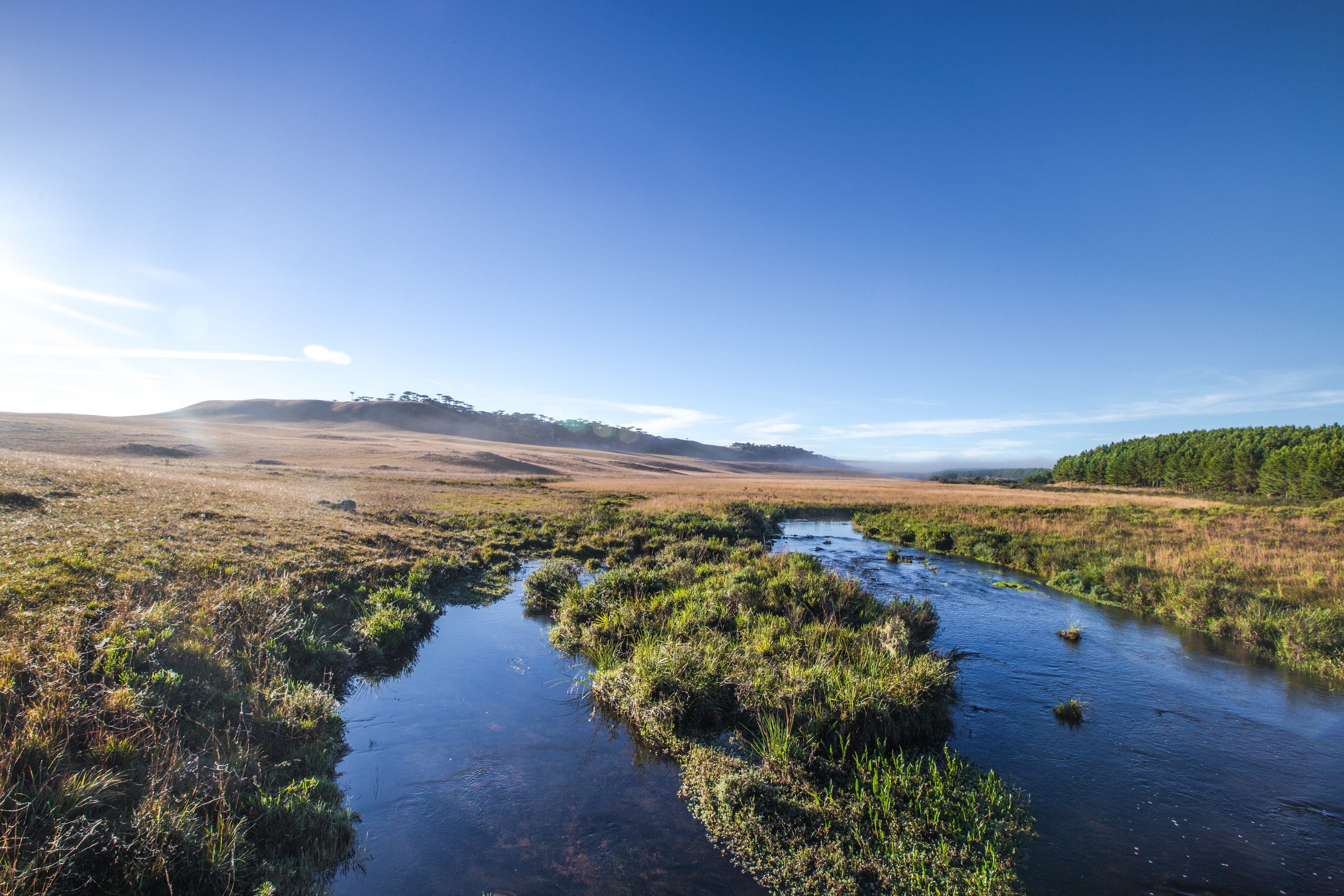 Paisagem típica da região dos campos de cima da serra, no Rio Grande do Sul.